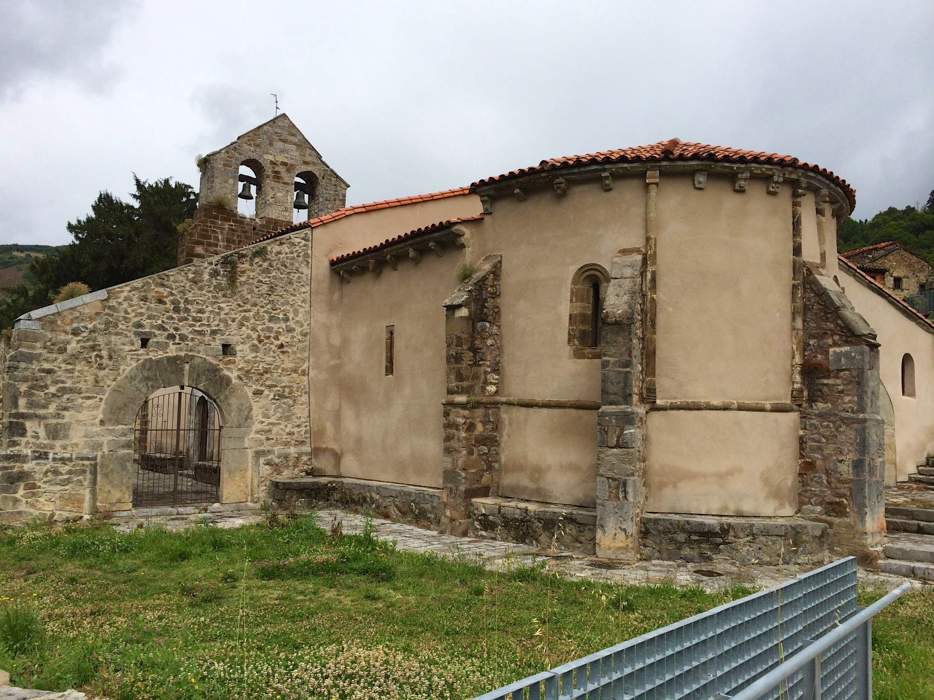 Iglesia de San Juan de Riomera, Santibáñez de la Fuente